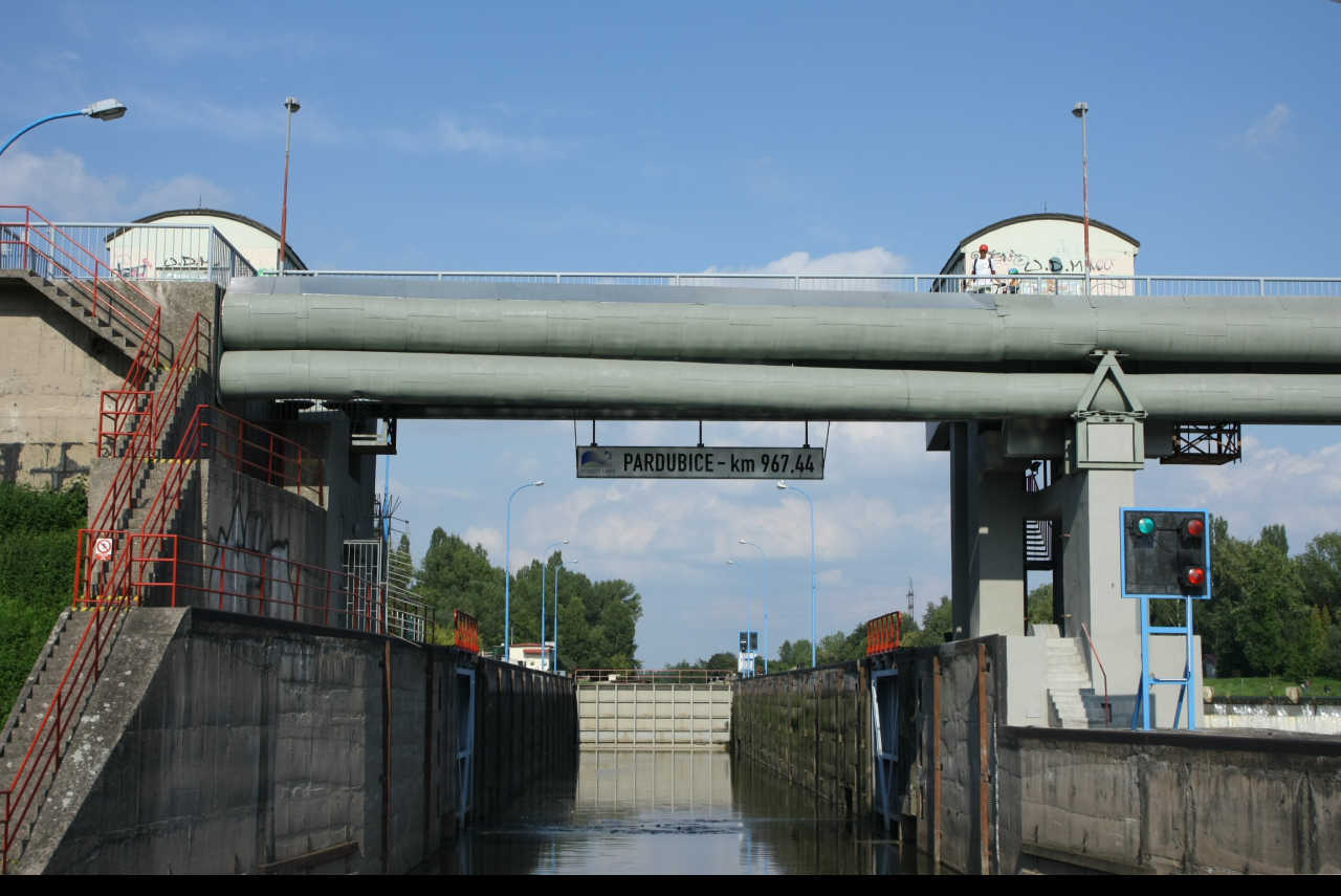 Vjezd do plavební komory na jezu v Pardubicích